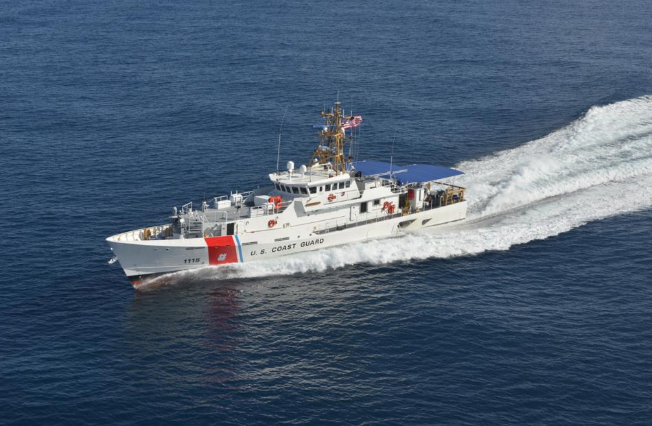 USCGC Joseph Napier